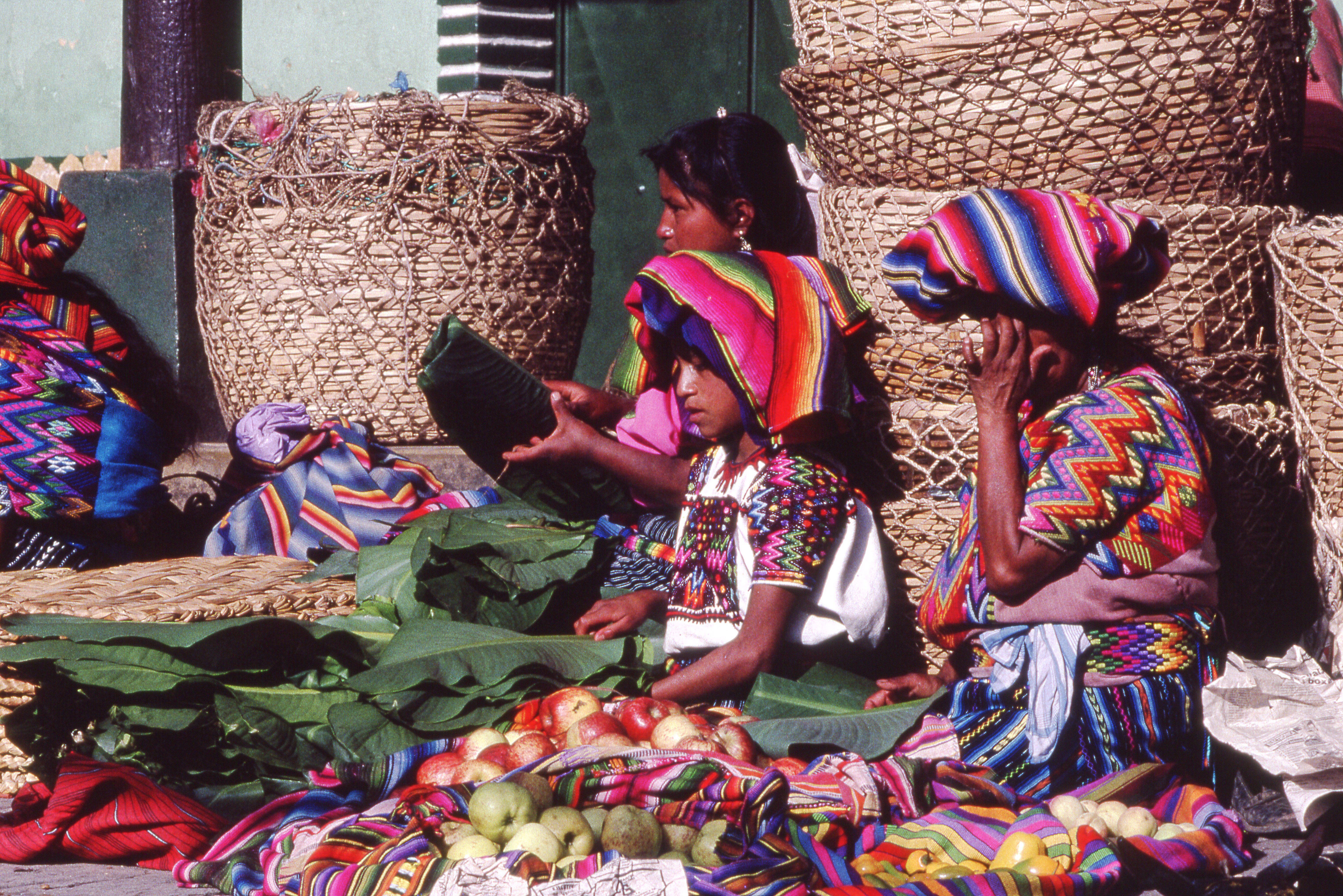 Guatémala_78.jpg Lac Atitlan LEICA M6 35MM